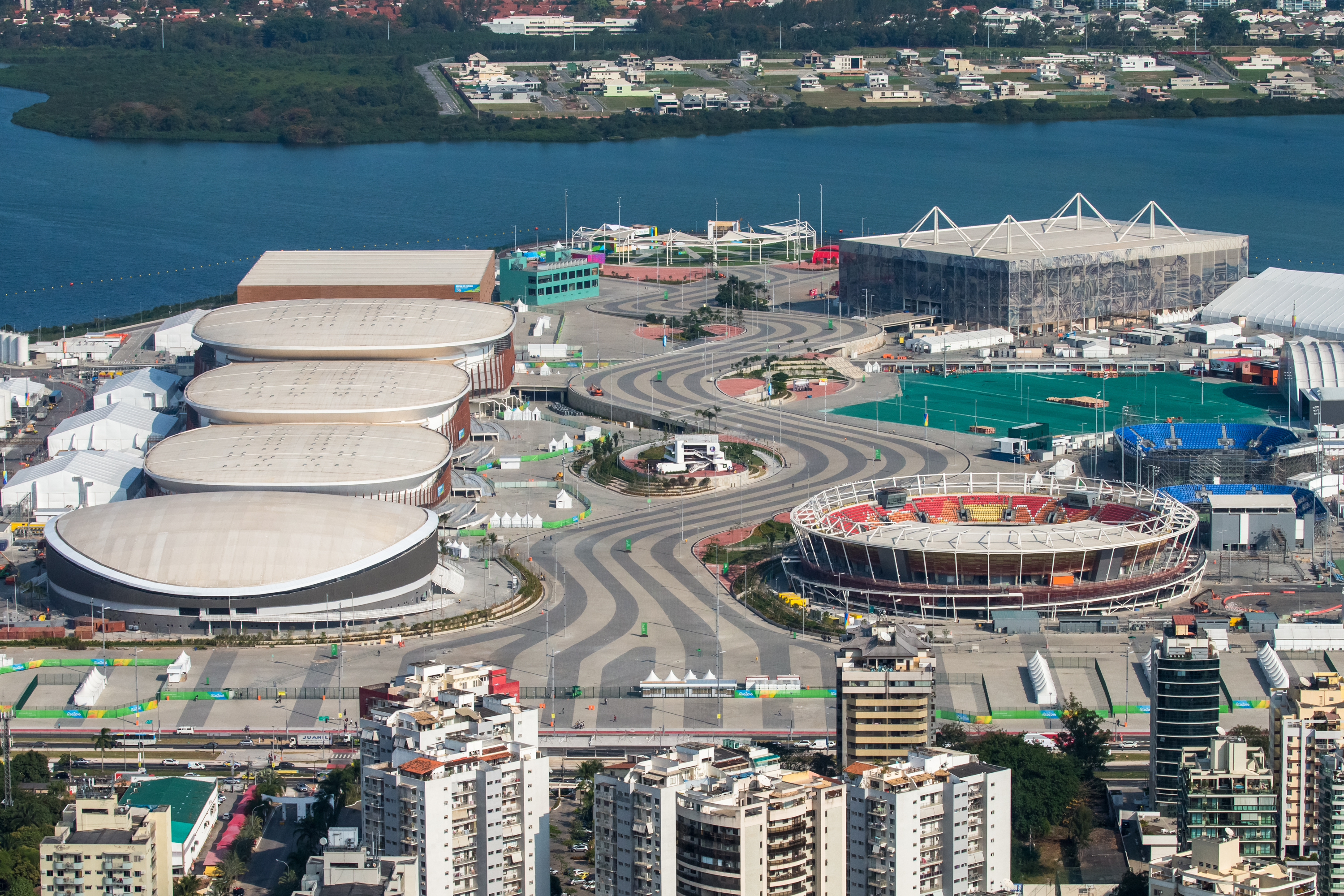 Visão geral do no Parque Olímpico da Barra.